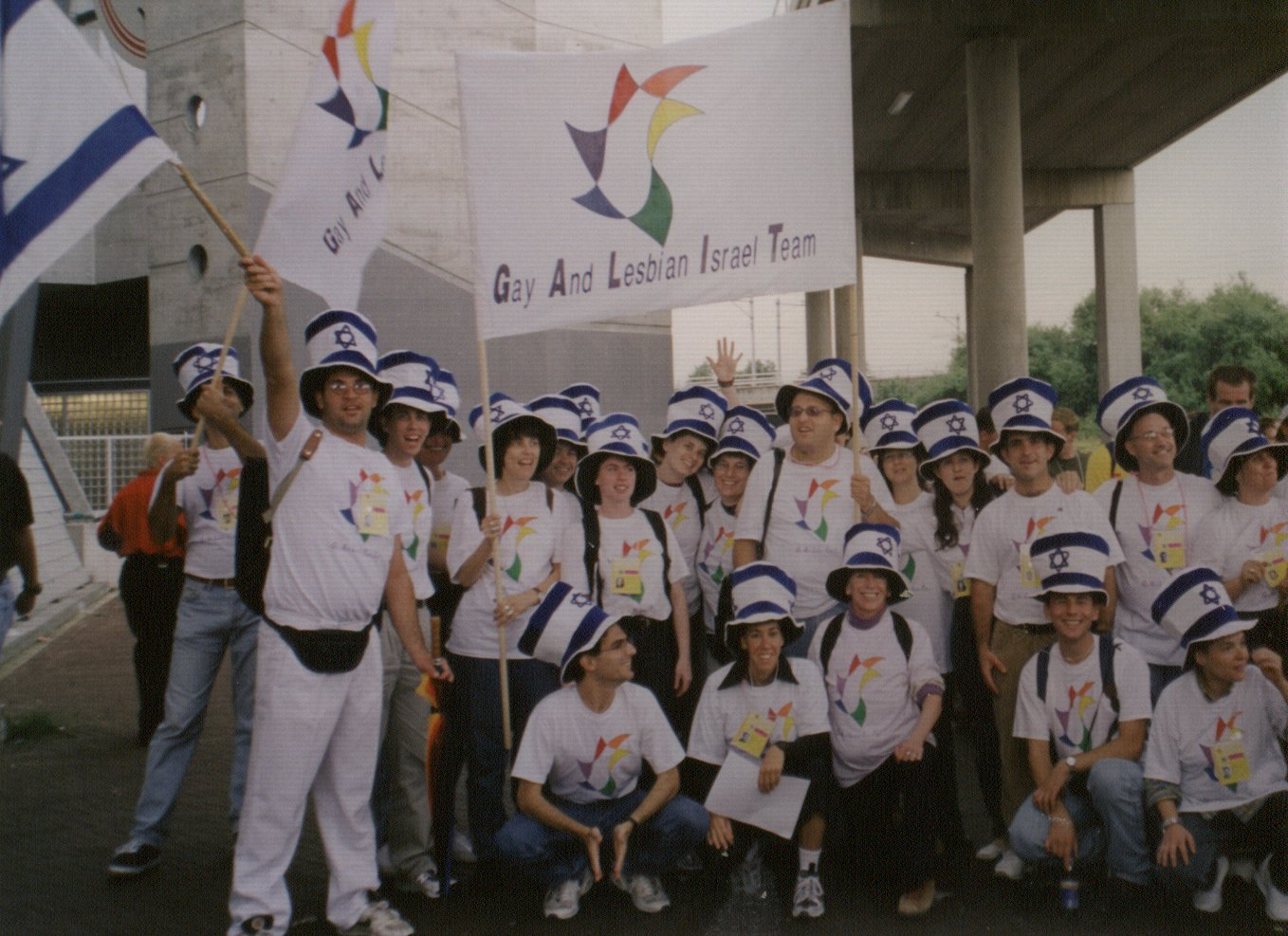 המשלחת הישראלית למשחקים הגאים, 1998